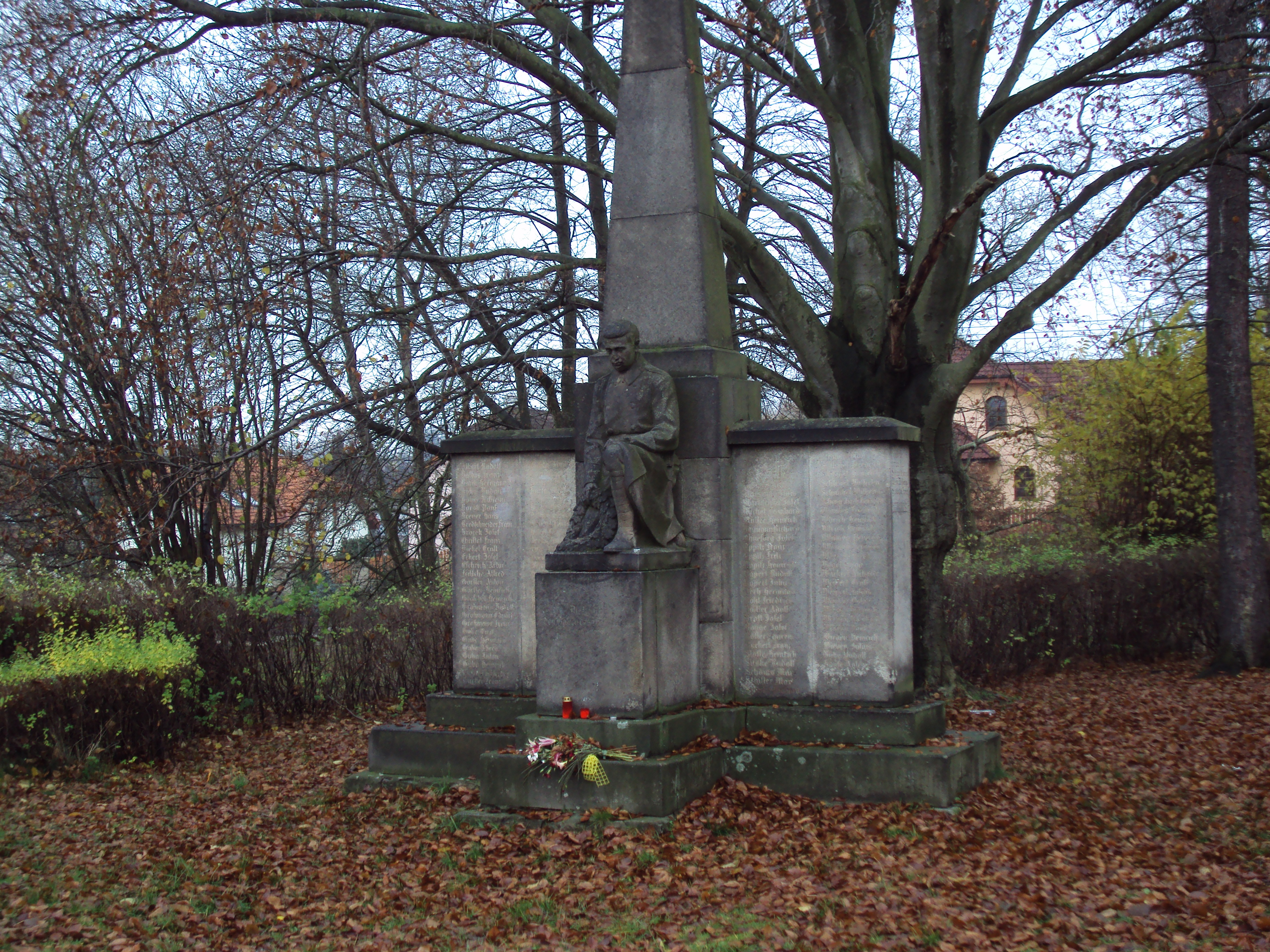 Památník zesnulých 1914-1918 u kostela v Arnultovicích, čtvrti Nového Boru